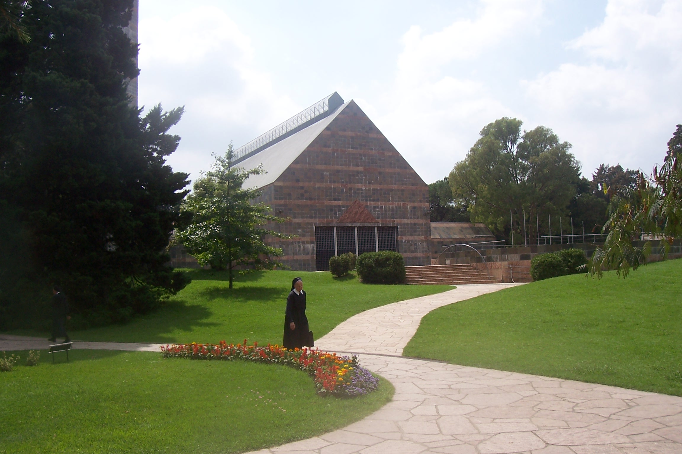 Iglesia construida en celebración del 100° aniversario del Movimiento apostólico de Schönstatt, en Florencio Varela, Argentina.